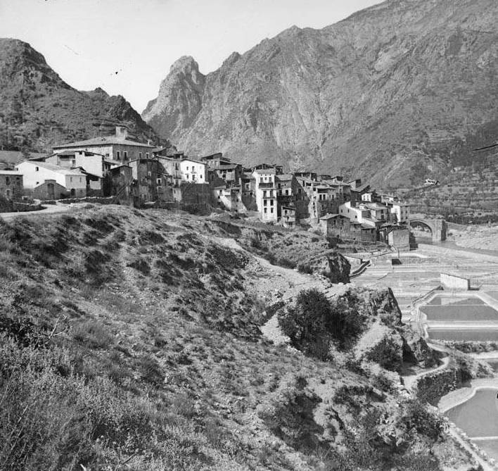 Imatge